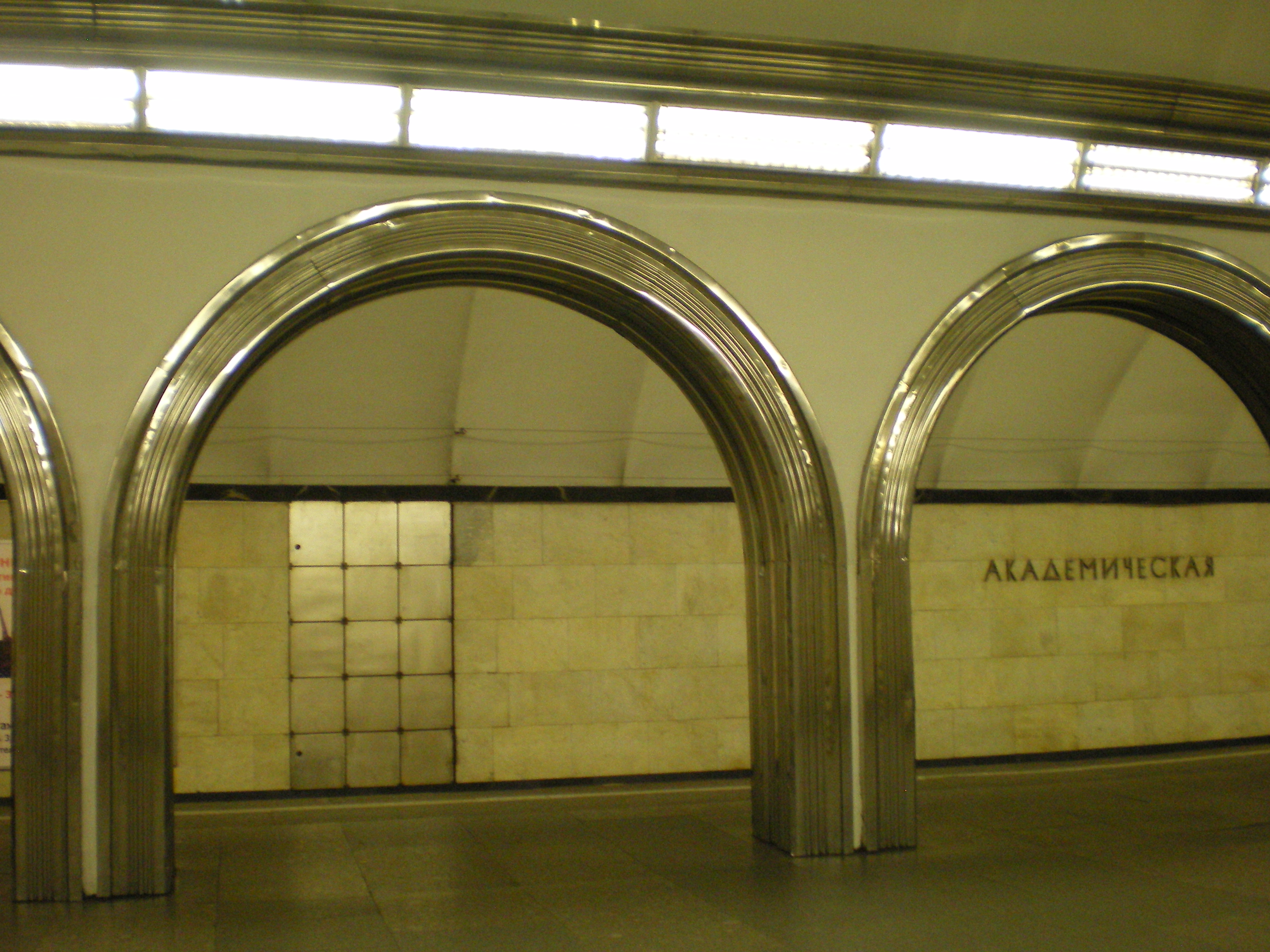 Станция метро «Академическая». Путевая стена, на ней название и дверь.